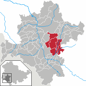 Verwaltungsgemeinschaft Dolmar in Thuringia - District Schmalkalden-Meiningen